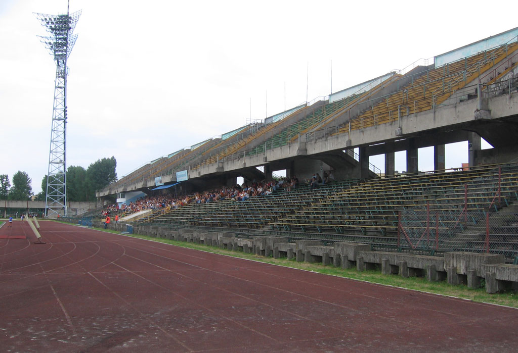 Zachodnia trybuna stadionu Stali Mielec, znajdująca się od strony ul. Kusocińskiego.